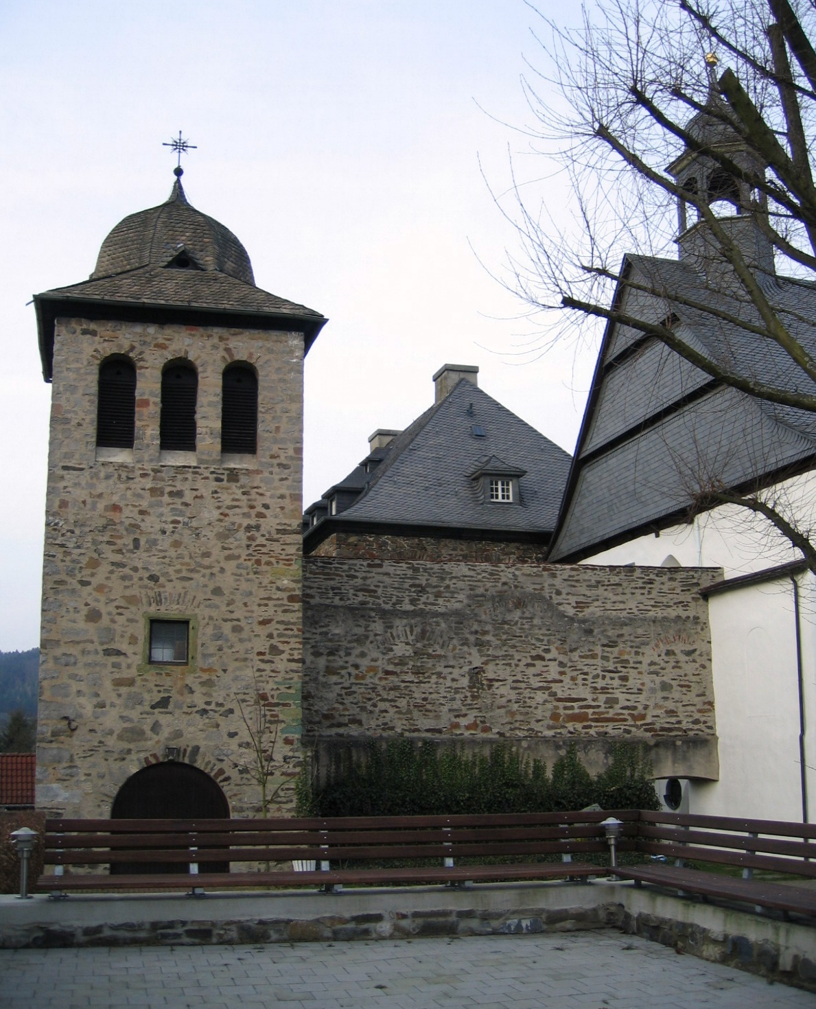 Ehemaliges Kloster Rumbeck in Arnsberg, Stadtteil Rumbeck.